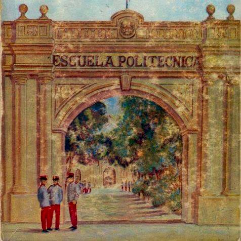 Pintura de la Escuela Politécnica en 1900.